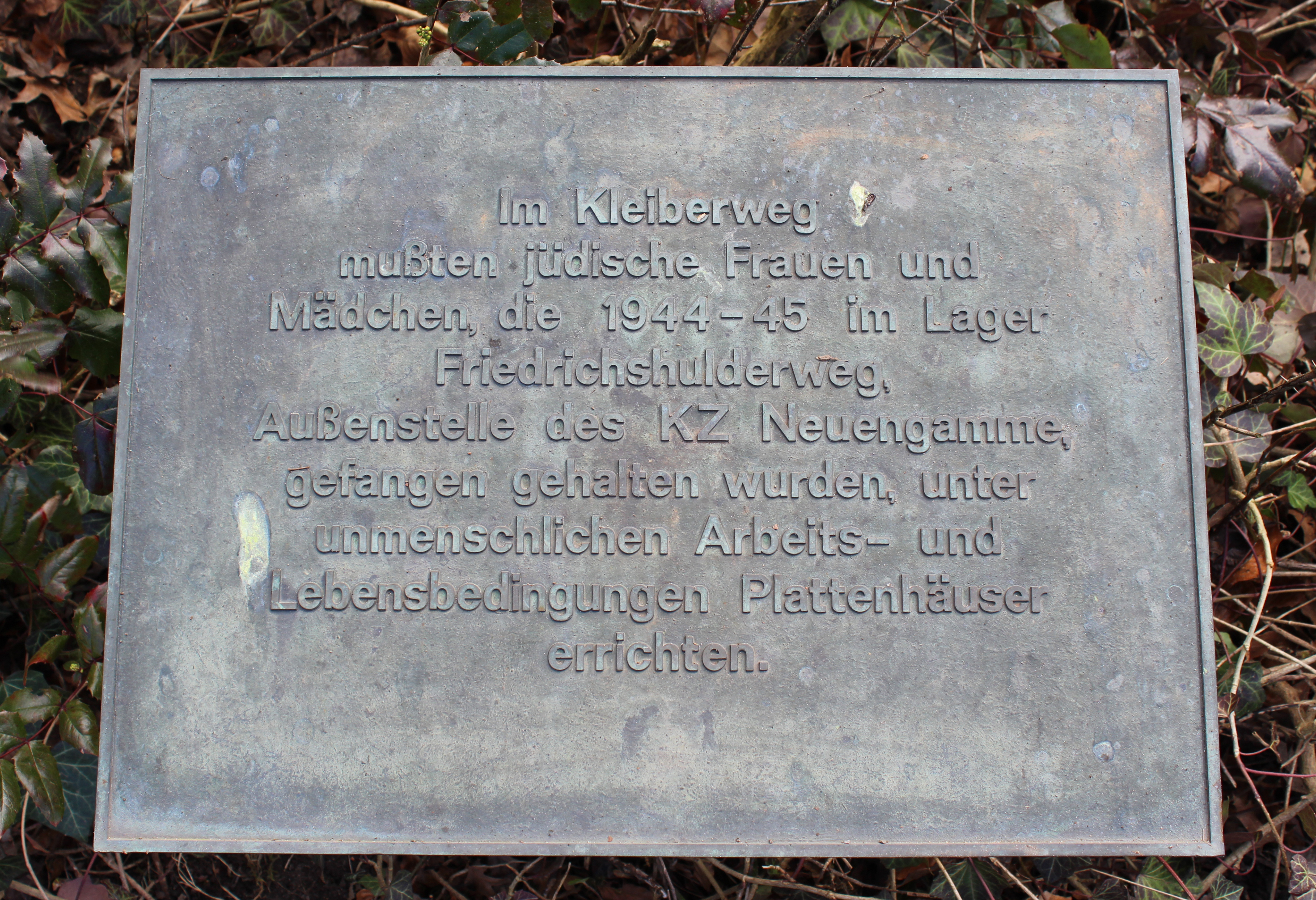 Bronzetafel zur Erinnerung an die im Außenlager Eidelstedt des KZ Neuengamme eingesetzten KZ-Häftlinge.